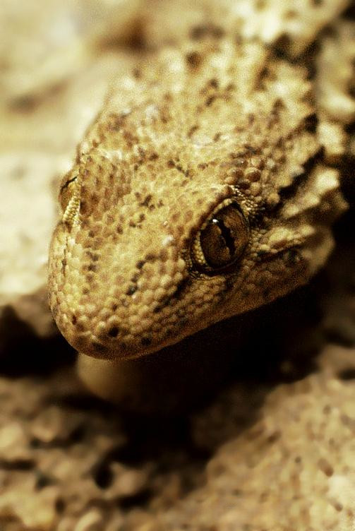 Fali gekkó (Tarentola muritanica fascircularis) Tunéziában